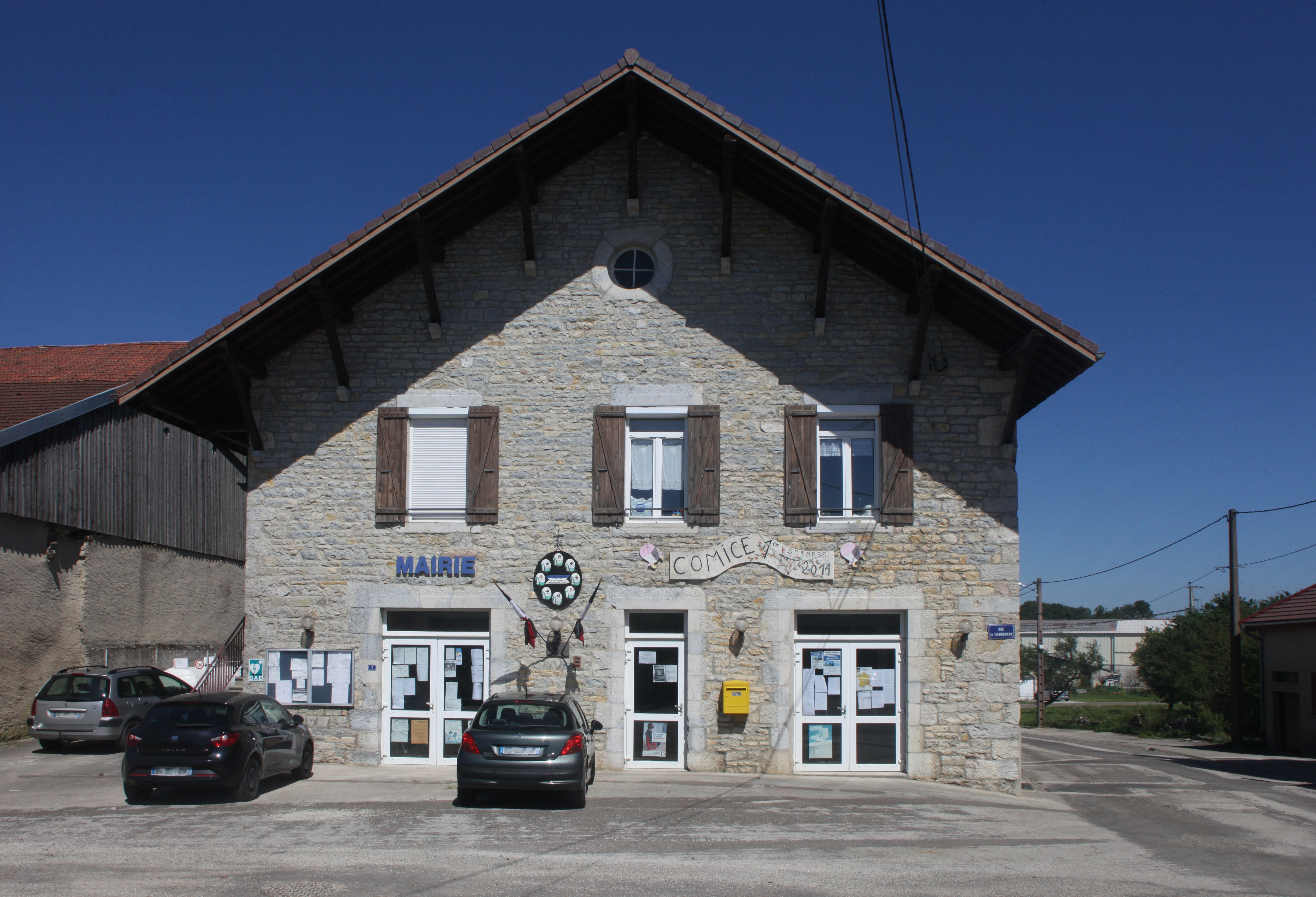 Mairie d'Onglières (Jura).